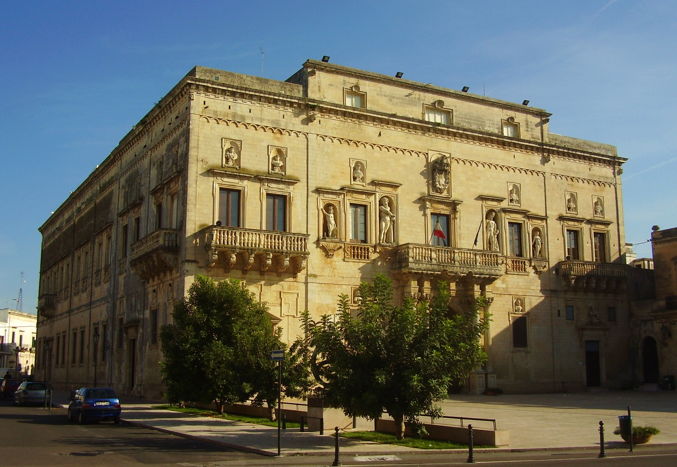 San Cesario di Lecce Palazzo Ducale